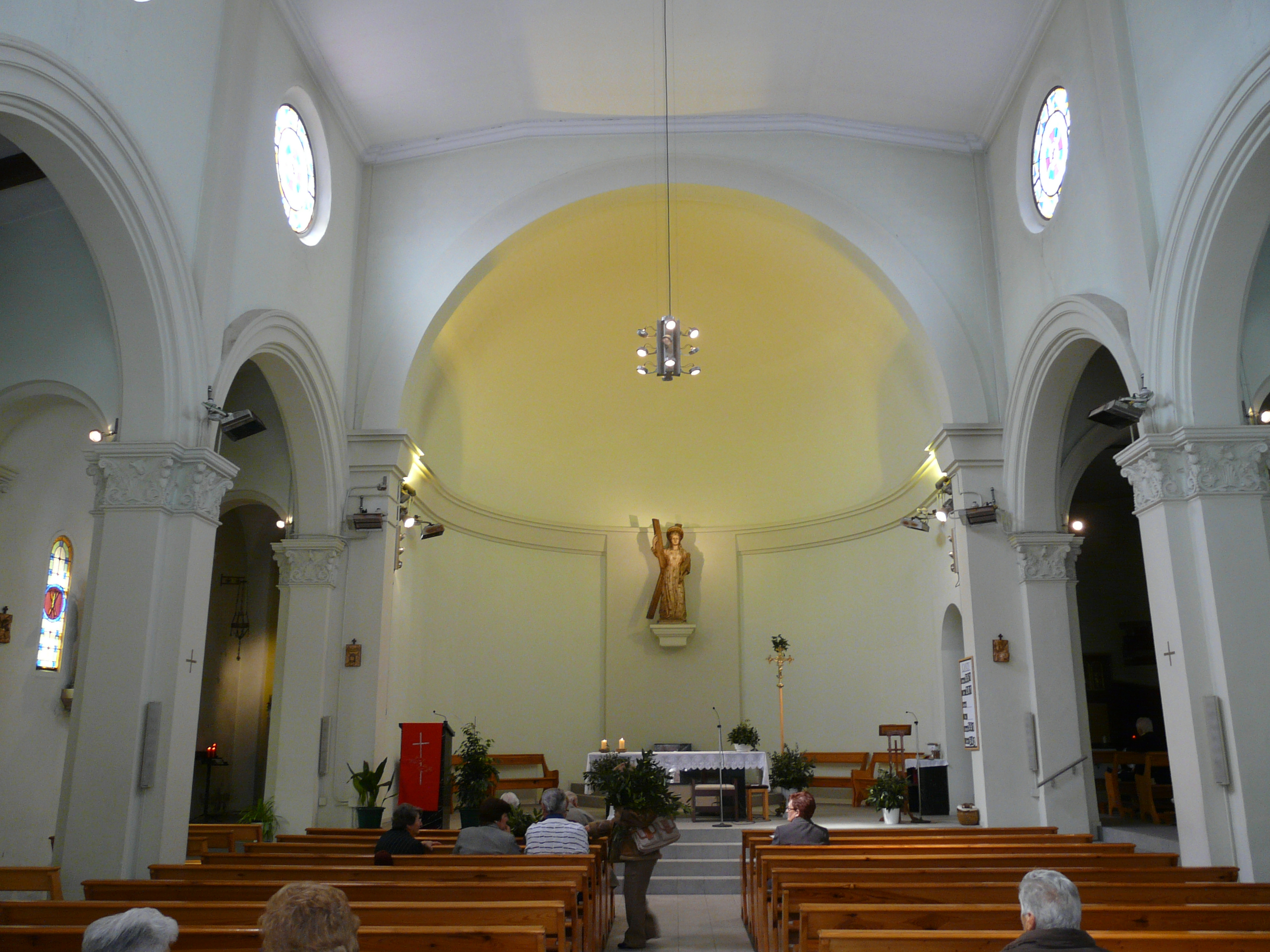 Església parroquial de Santa Eulàlia. C. Montserrat (El Papiol). Diumenge de Rams (fixeu-vos en els rams de llorer). Object location41° 26′ 20.68″ N, 2° 00′ 37.94″ E